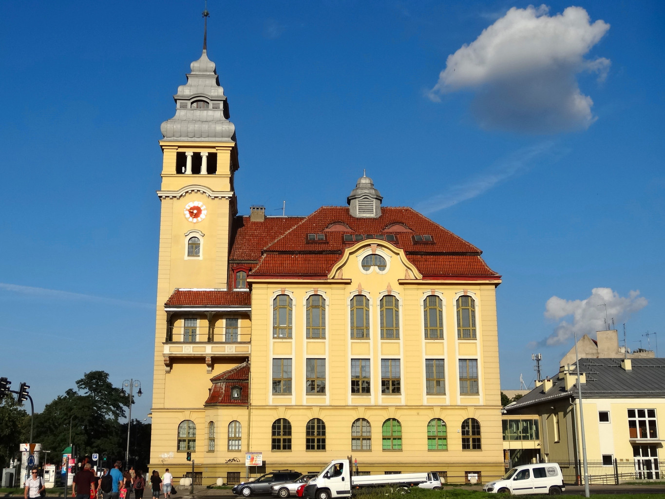 Dawna Szkoła Rzemiosła i Przemysłu Artystycznego, zbud. 1910-1911, obecnie Zespół Szkół Mechanicznych, Bydgoszcz ul. Świętej Trójcy 37